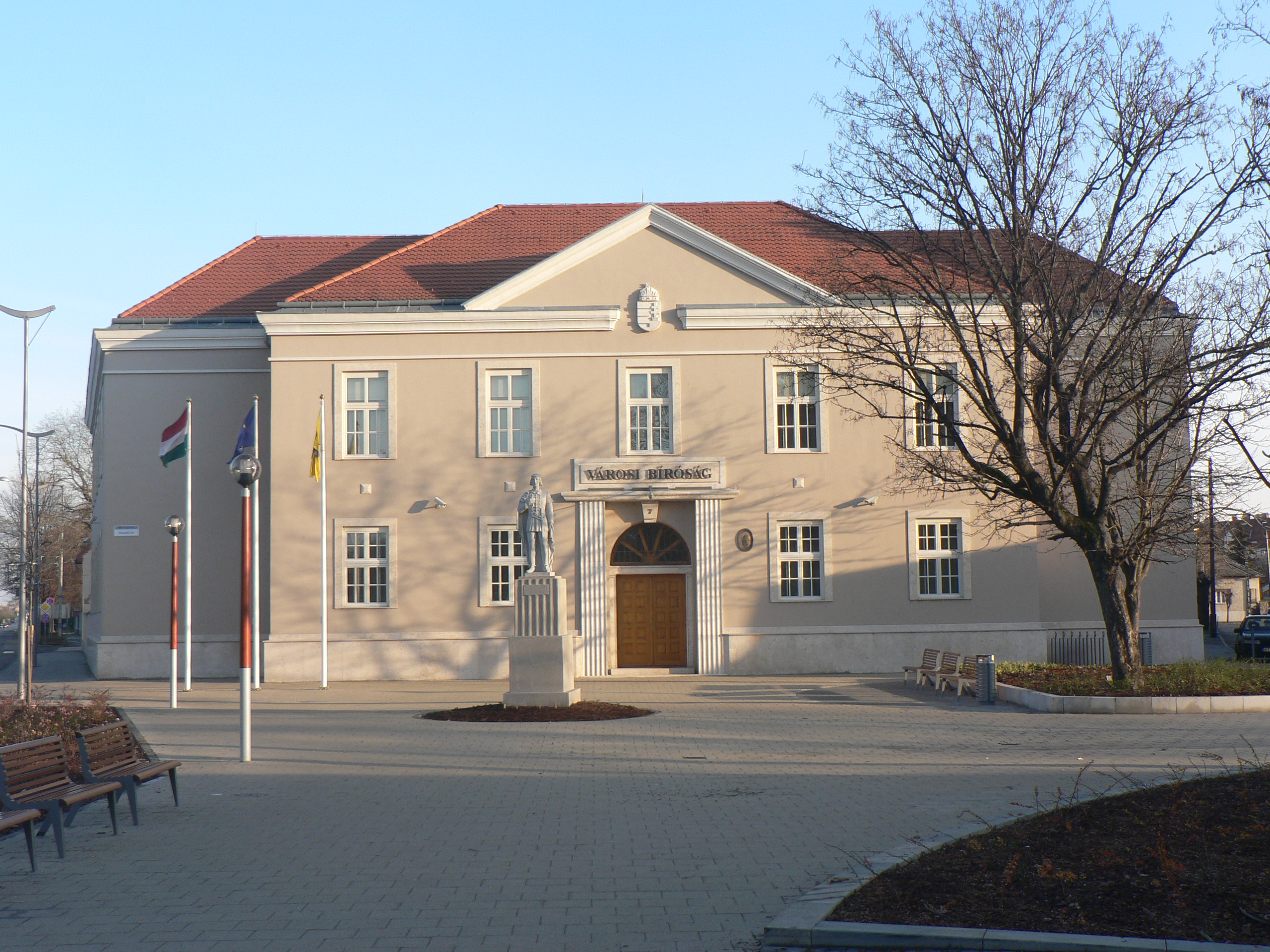 == Licenc: ==